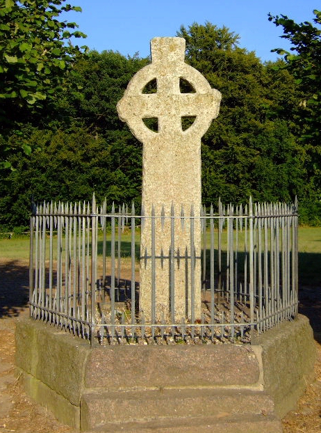 Ansveruskreuz Standort: Einhaus - in der Nähe von Ratzeburg Material: Gotländischer Kalkstein - 15.Jahrhundert Aufnahme: 24.7.2006 Url